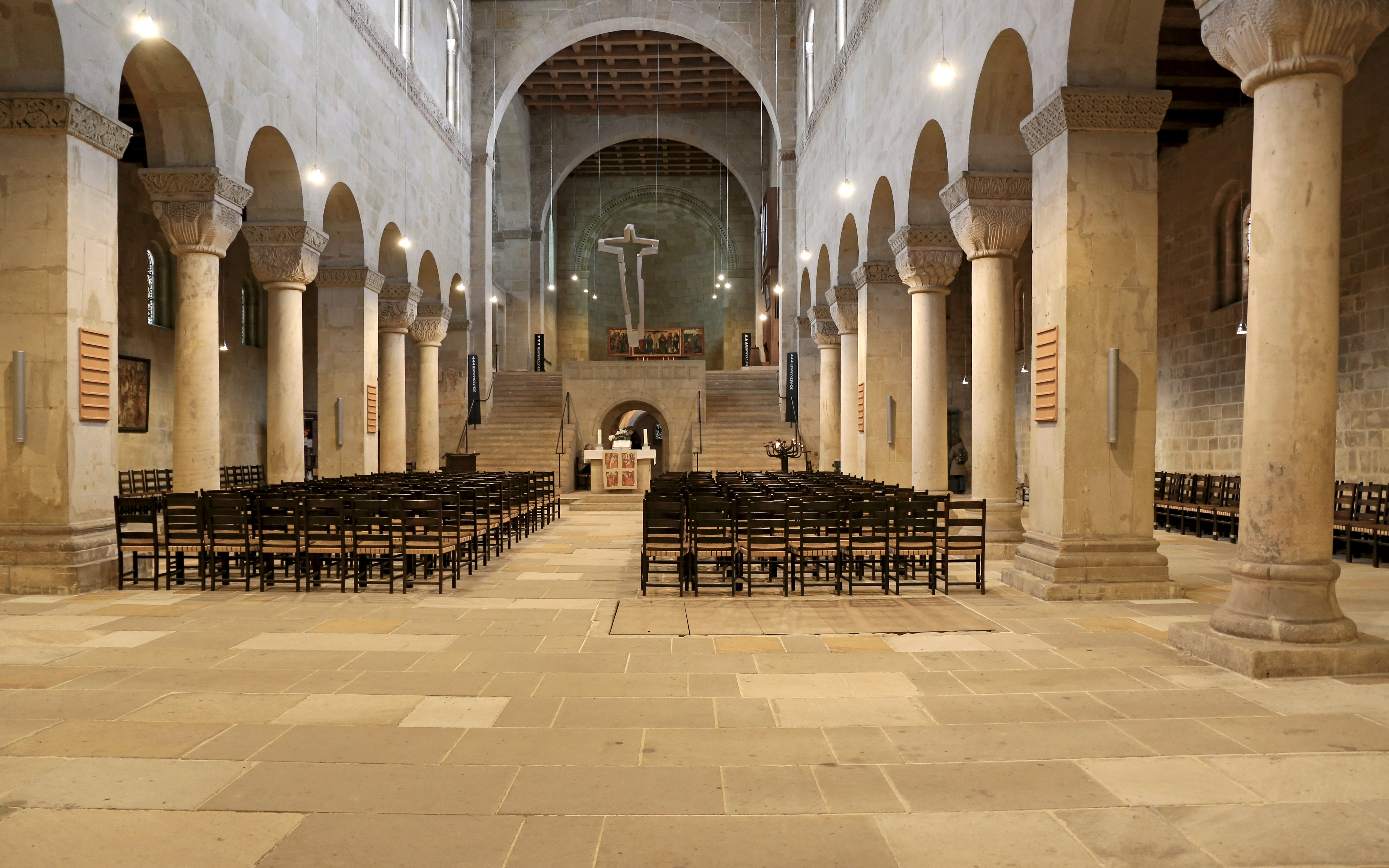 Inneres der Stiftskirche St. Servatius in Quedlinburg